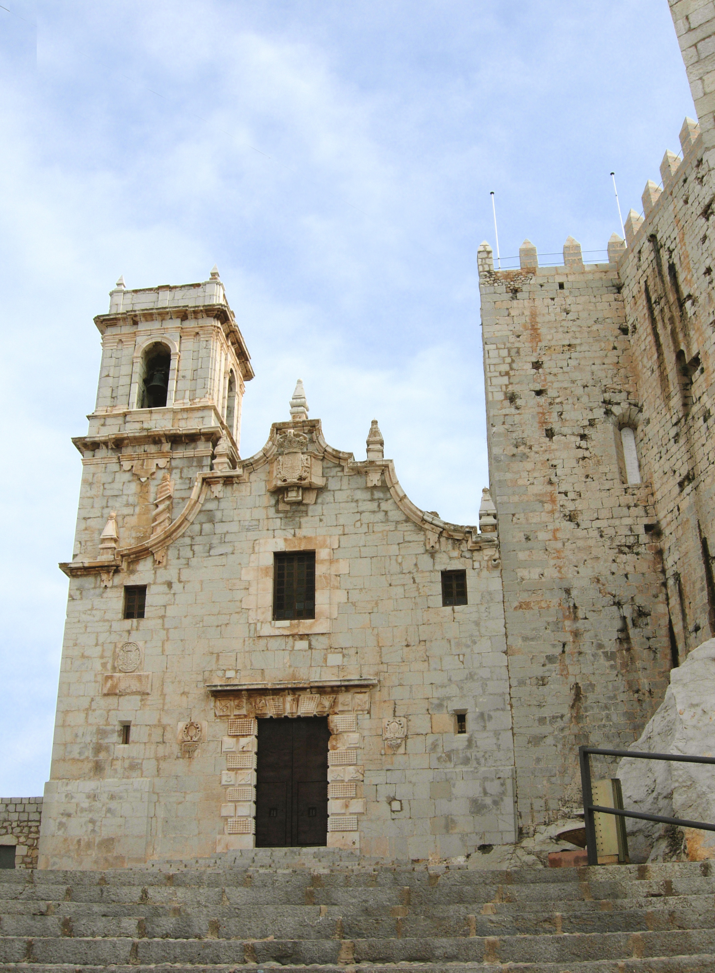 Peñiscola - Ermitorio de la Madre de Dios de Ermitana.